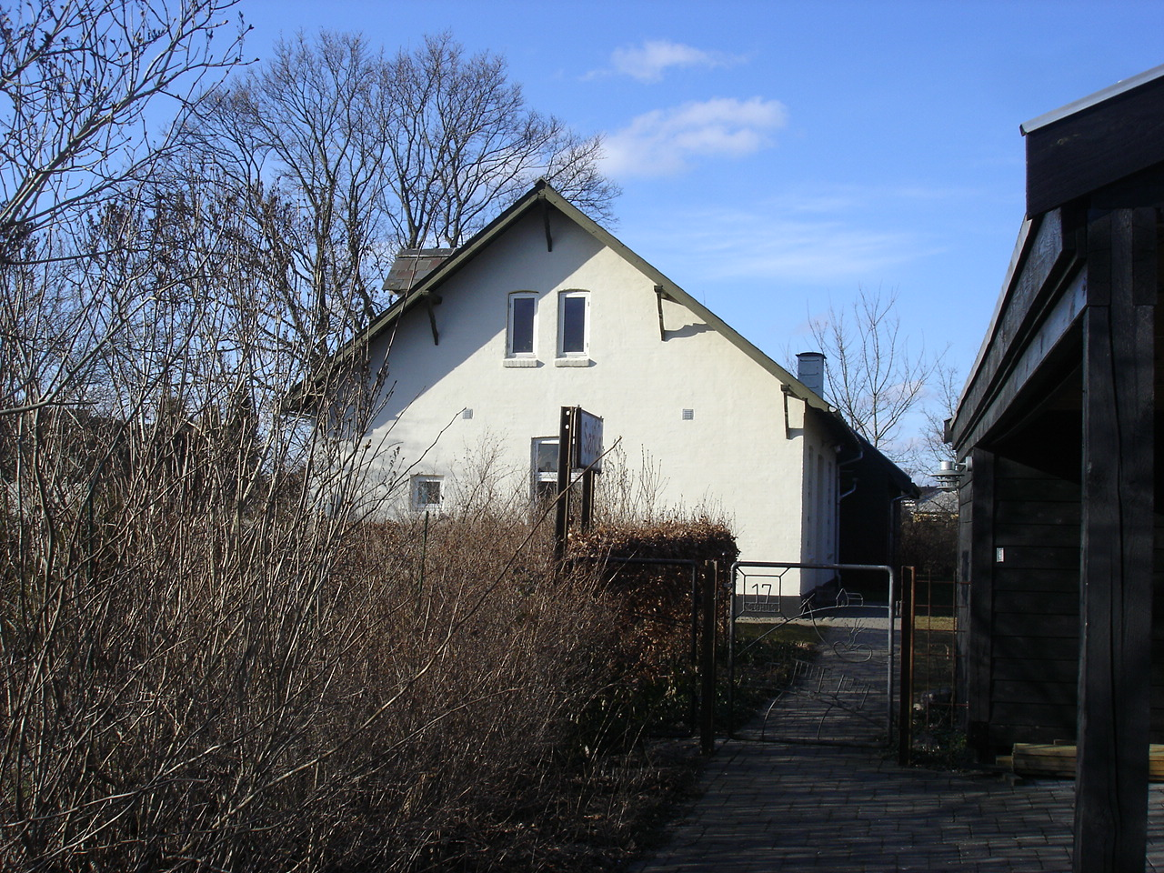 Søhus Station fra S